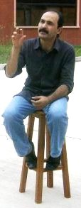 El músico Yalo Cuellar en una entrevista realizada en Yacuiba, 16 de diciembre de 2009. Fotografía: José Luis Claros López